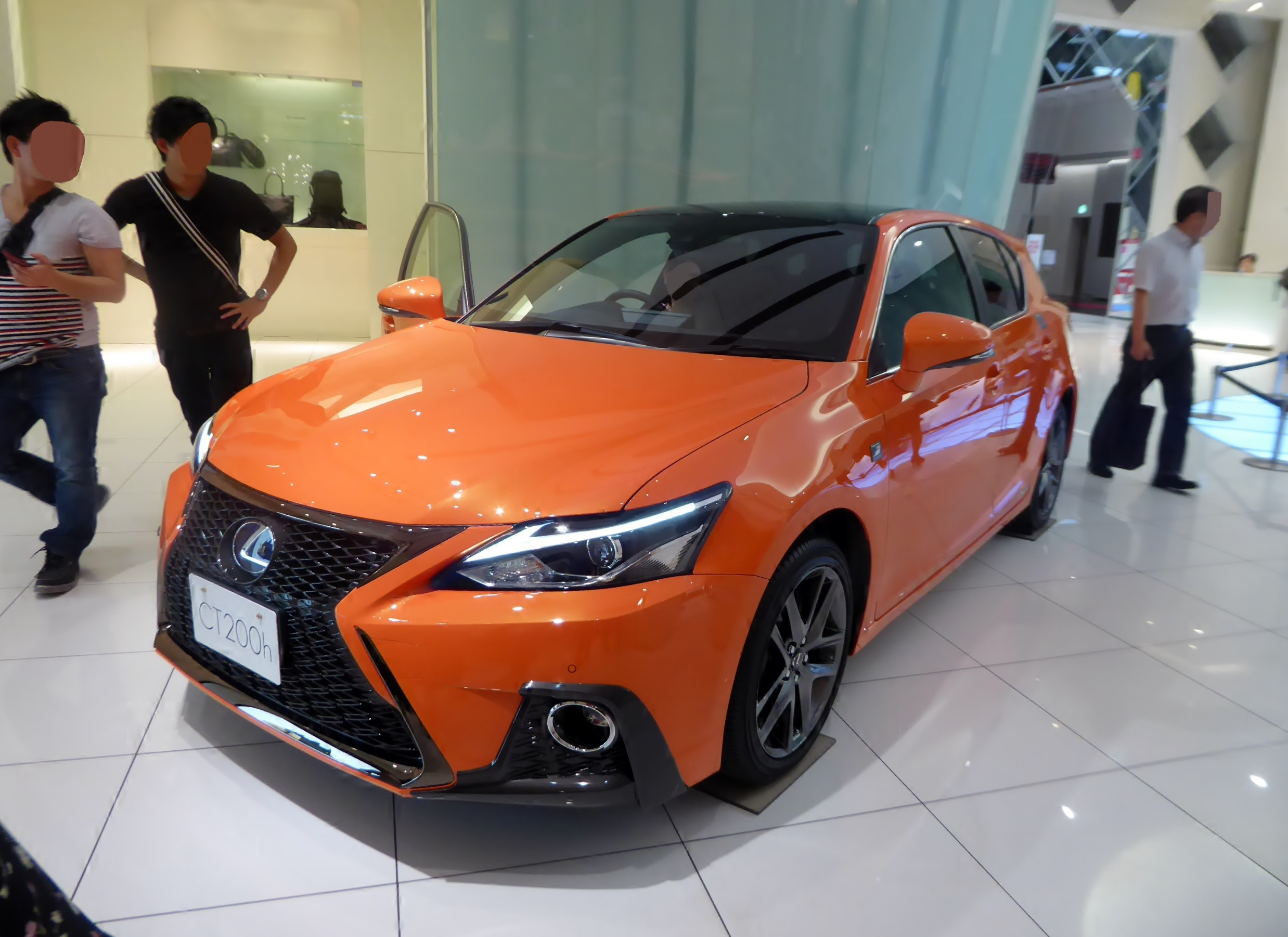 DAA-ZWA10-AHXBB型レクサス・CT200h Fスポーツをフロントから撮影。